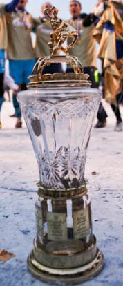 RPL Trophy